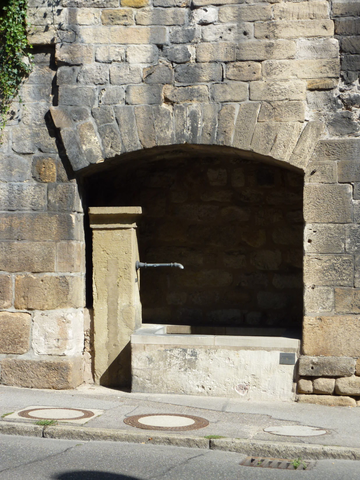 Brunnen in der Mauer bei Augustinerstr. 8, Esslingen